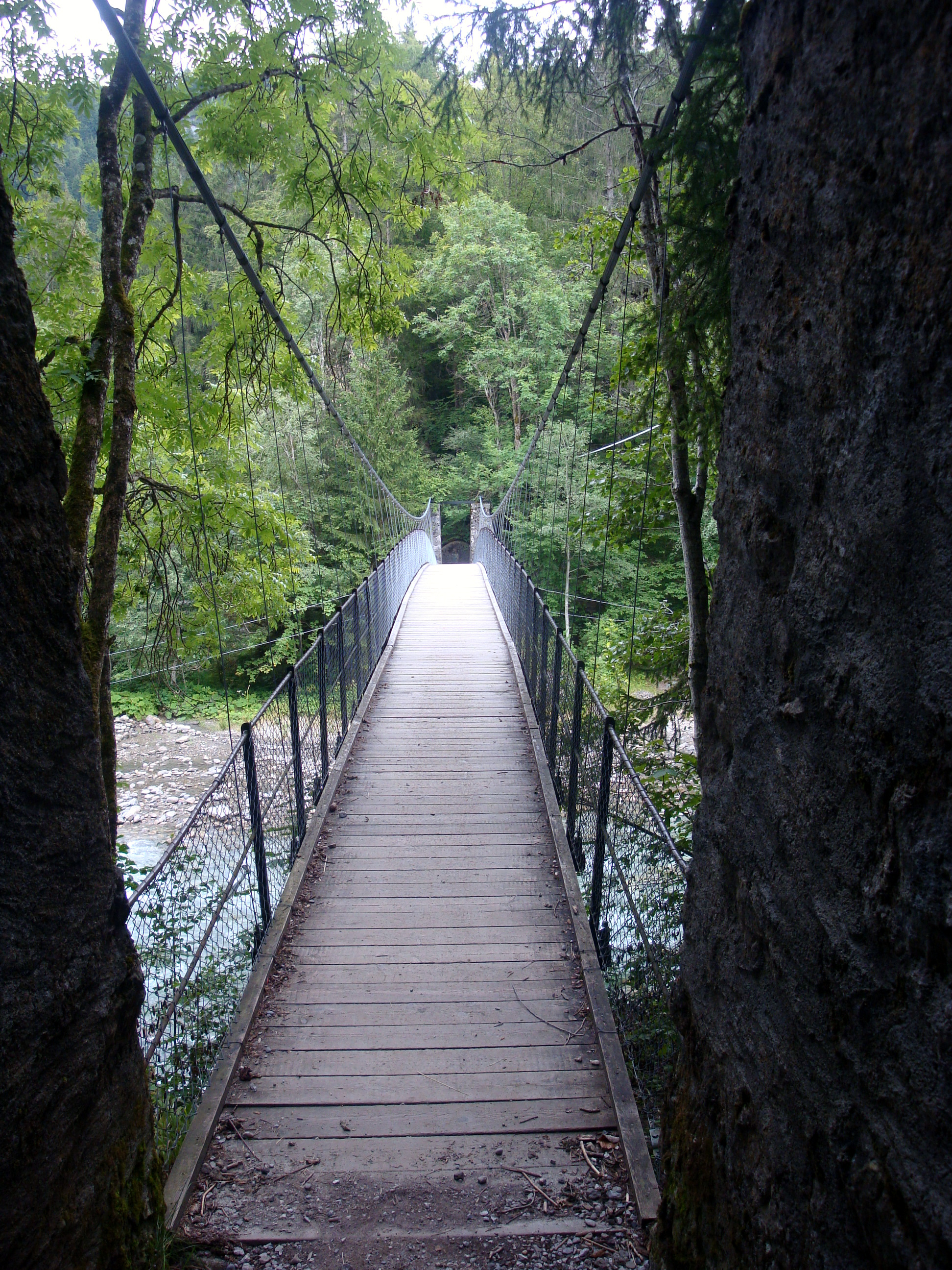 Pont suspendu avec plancher de bois. Construit en 1883